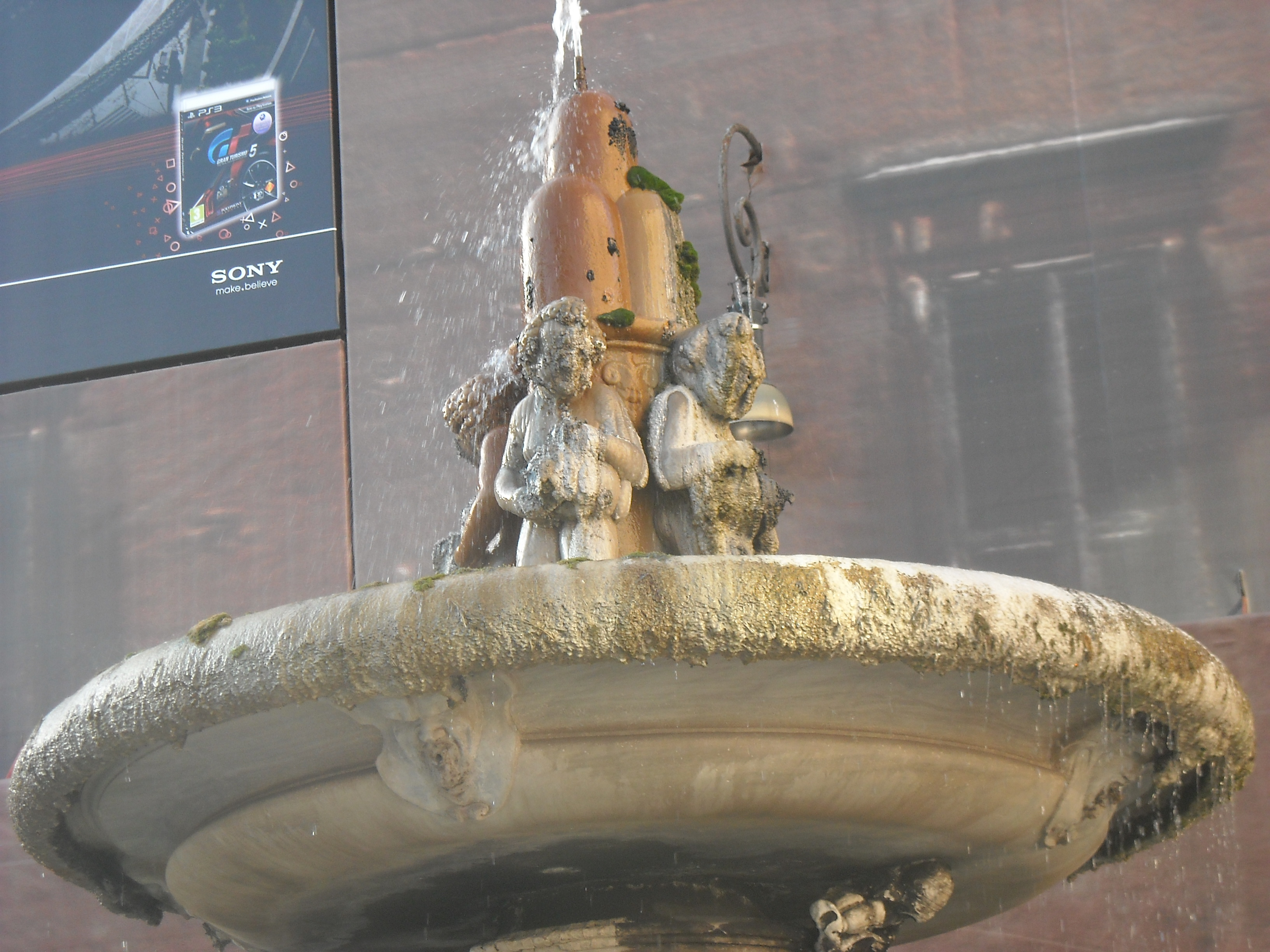 Fontana di piazza dell'Aracoeli - particolare